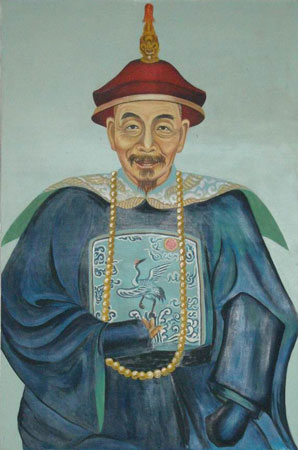 李光地，清朝直隸巡撫、吏部尚書、文淵閣大學士。